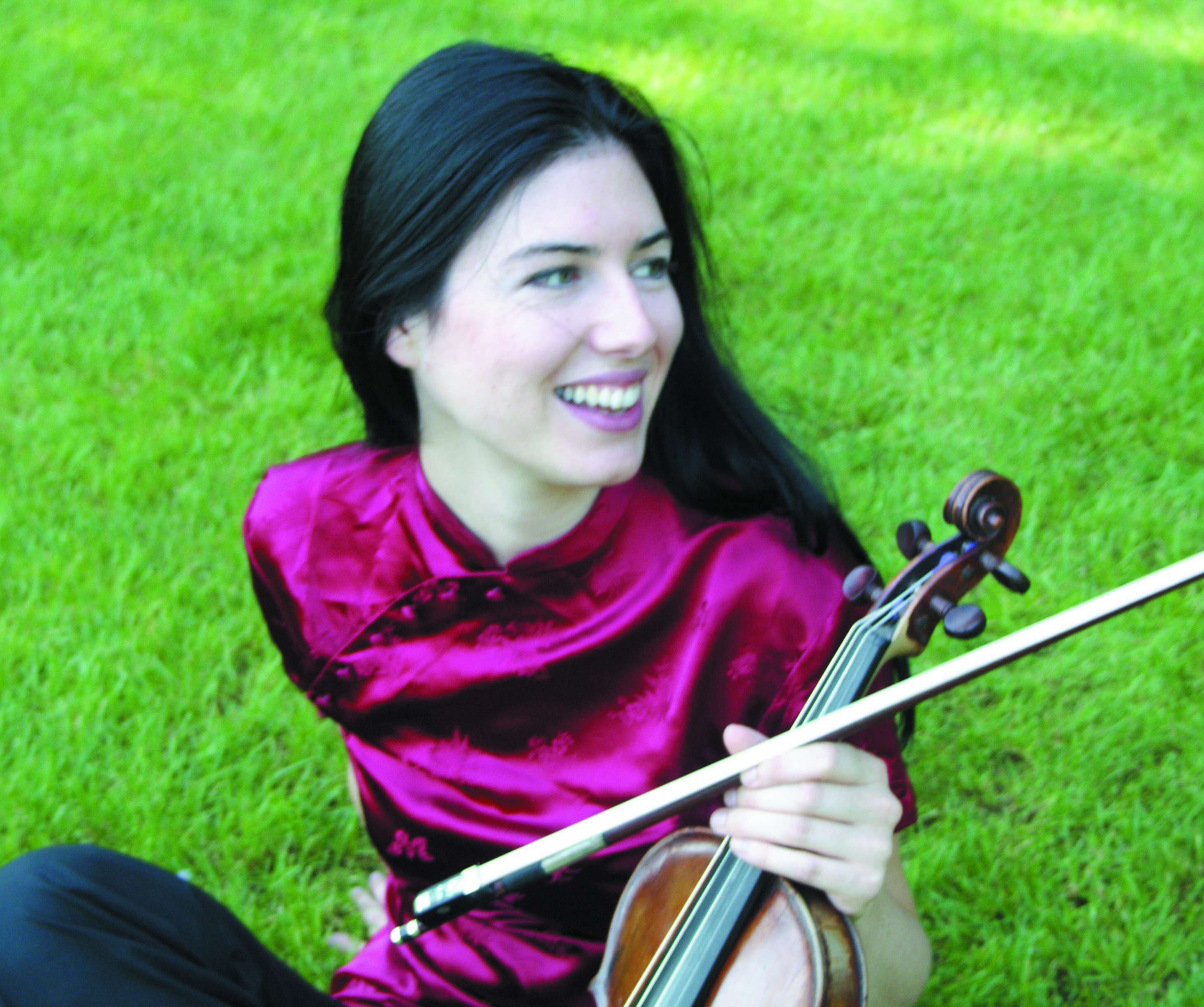 Sara Chenal 2